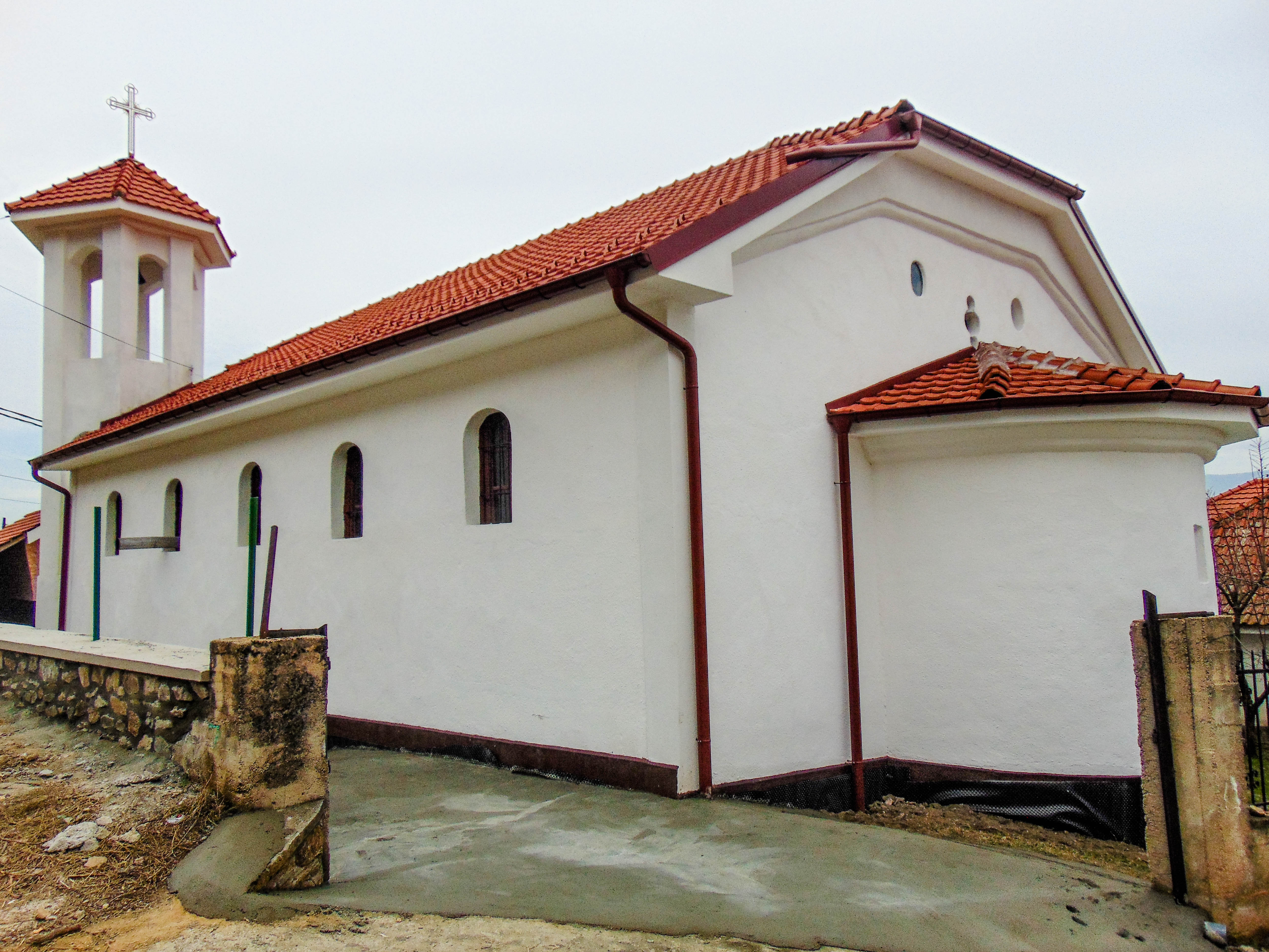 Црква „Св. Константин и Елена “ - Мокрино